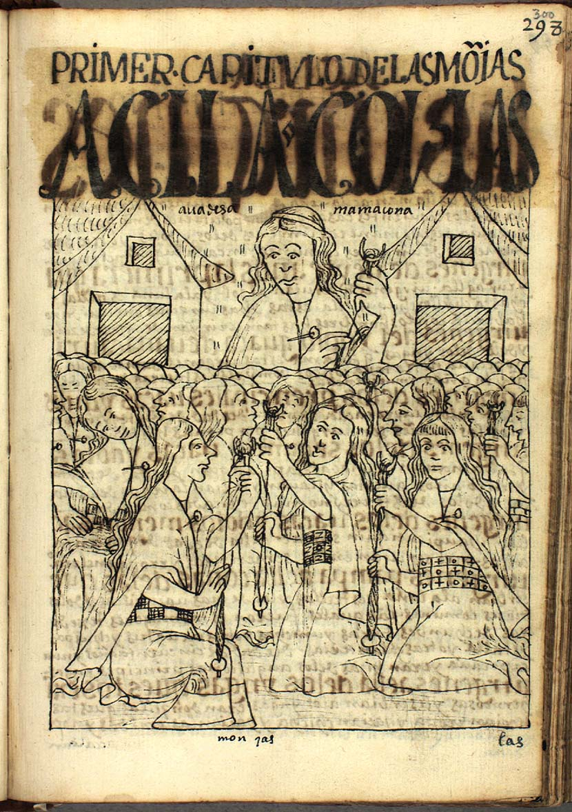 Disegno di Vergini del Sole